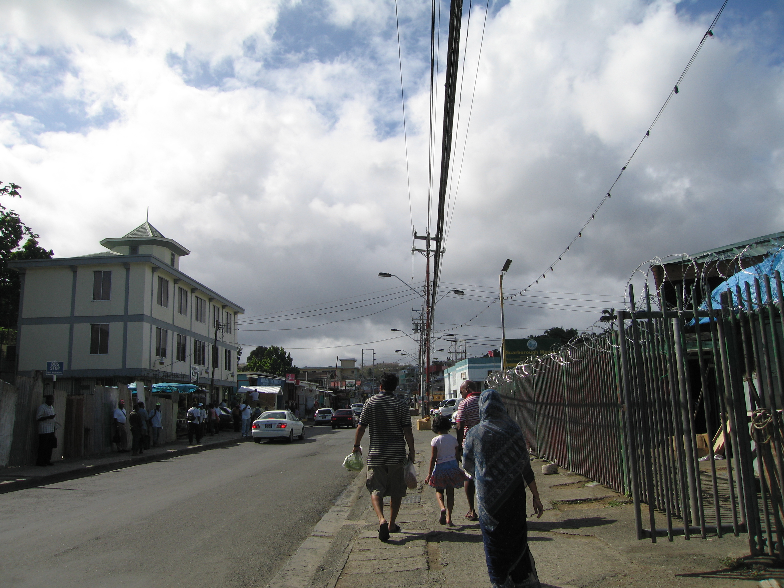 Скарбъроу.